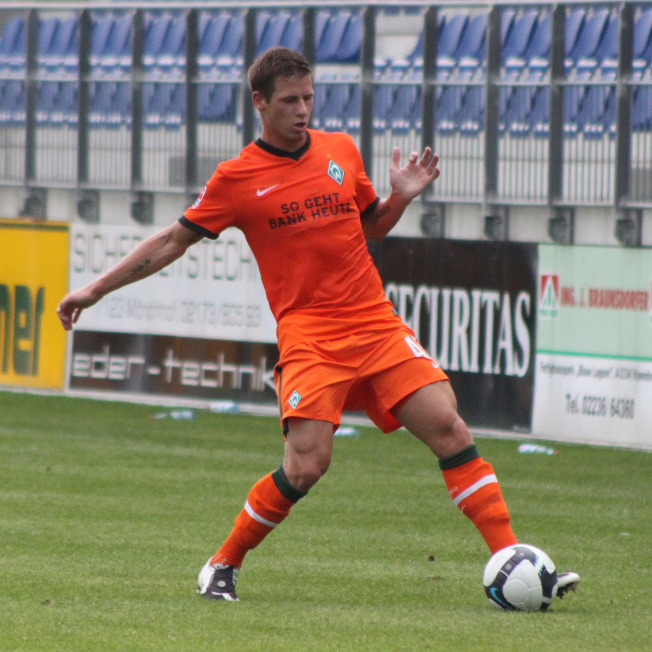 Timo Perthel - SV Werder Bremen (1)